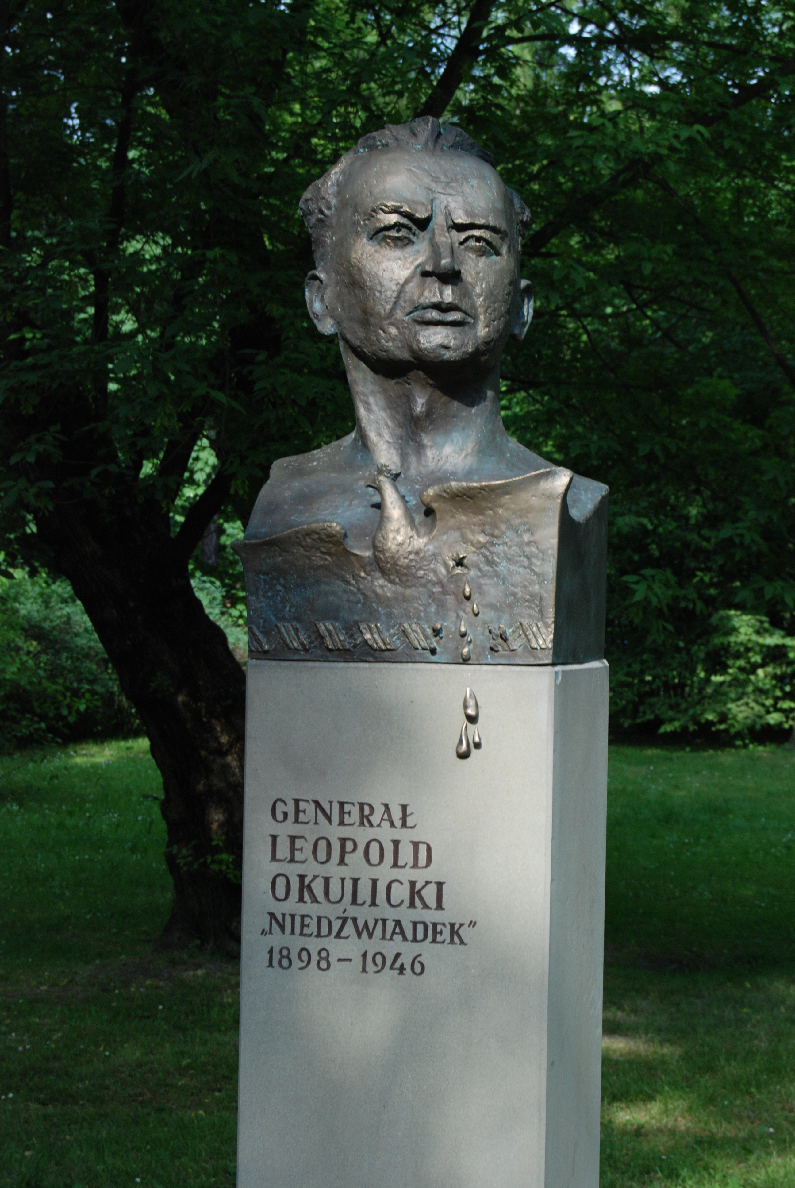 Leopold Okulicki pomnik park Jordana Kraków